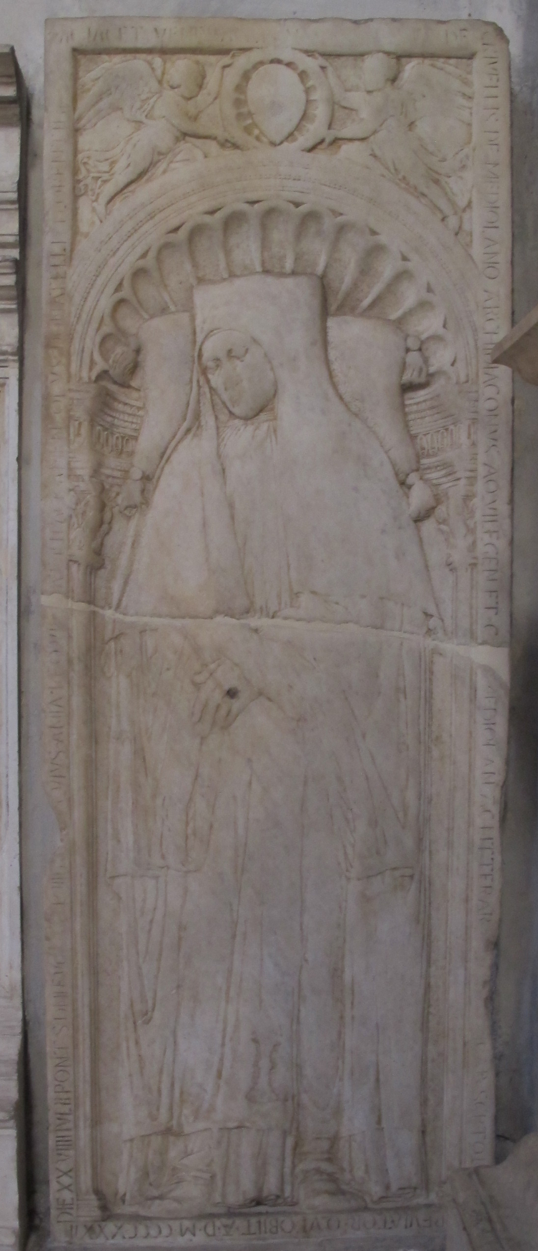 Donatello, Tomba di Giovanni Crivelli